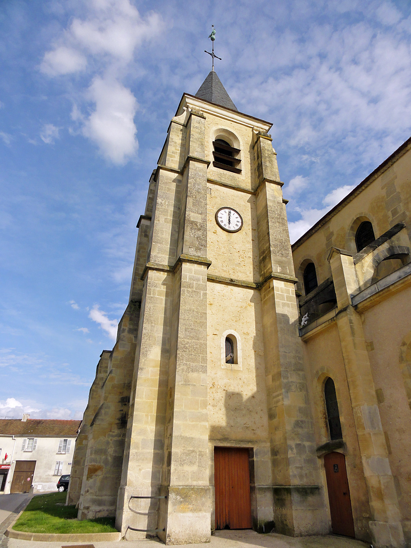 Clocher de l'église Sainte-Madeleine de Domont, Val-d'Oise, France.